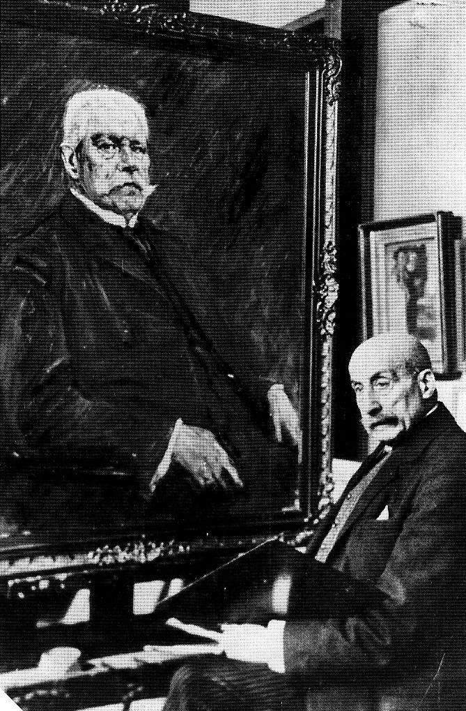 Max Liebermann vor dem „Bildnis Paul von Hindenburg“, 1927.